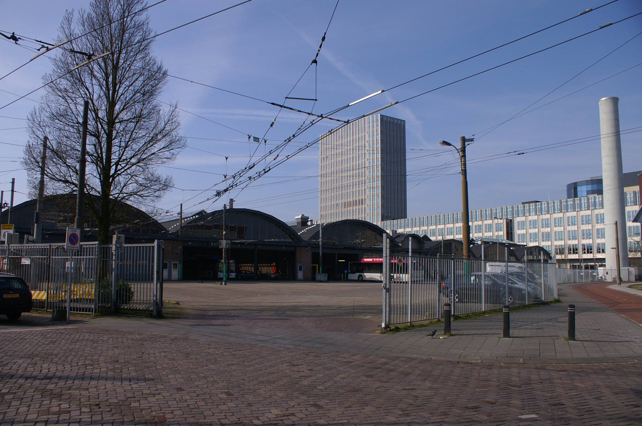 Remise van de Arnhemse Trolleybussen